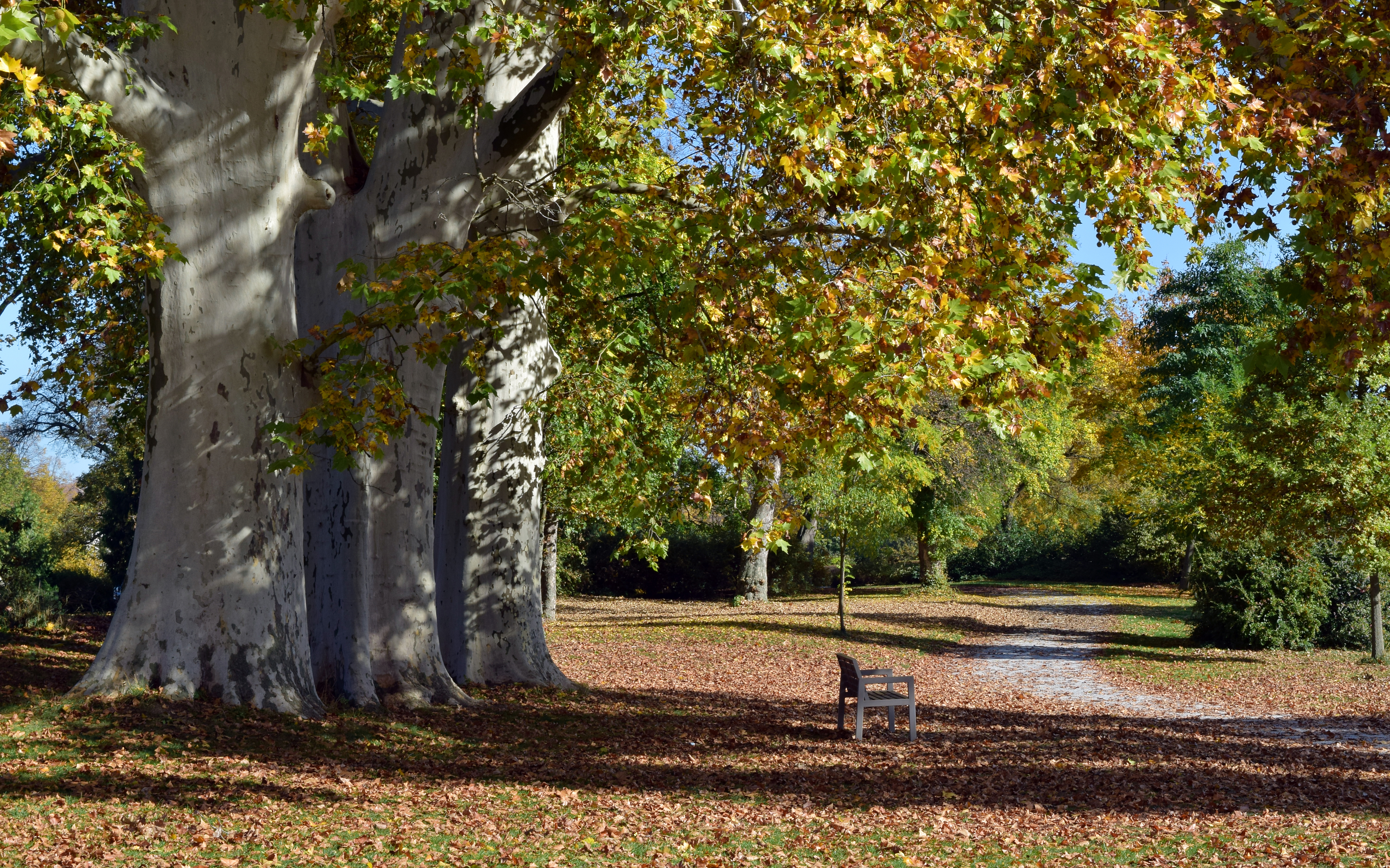 Die drei Platanen im Schlosspark Grafenegg sind der letzte Rest einer 200 Jahre alten Allee. Der "wertvolle Baumbestand" des Schlossparks wird vom Denkmalschutz explizit erwähnt.